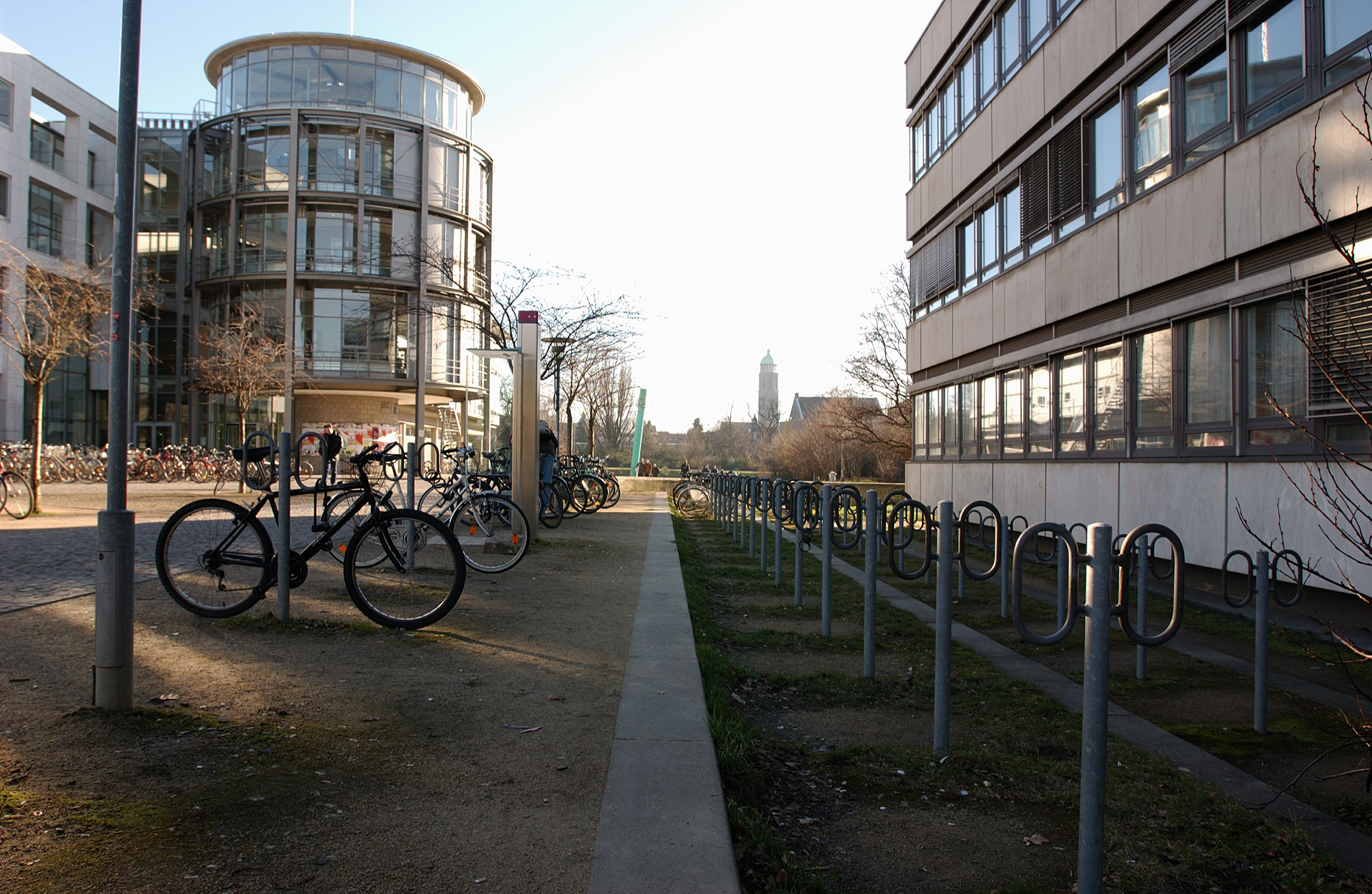 Goettingen University